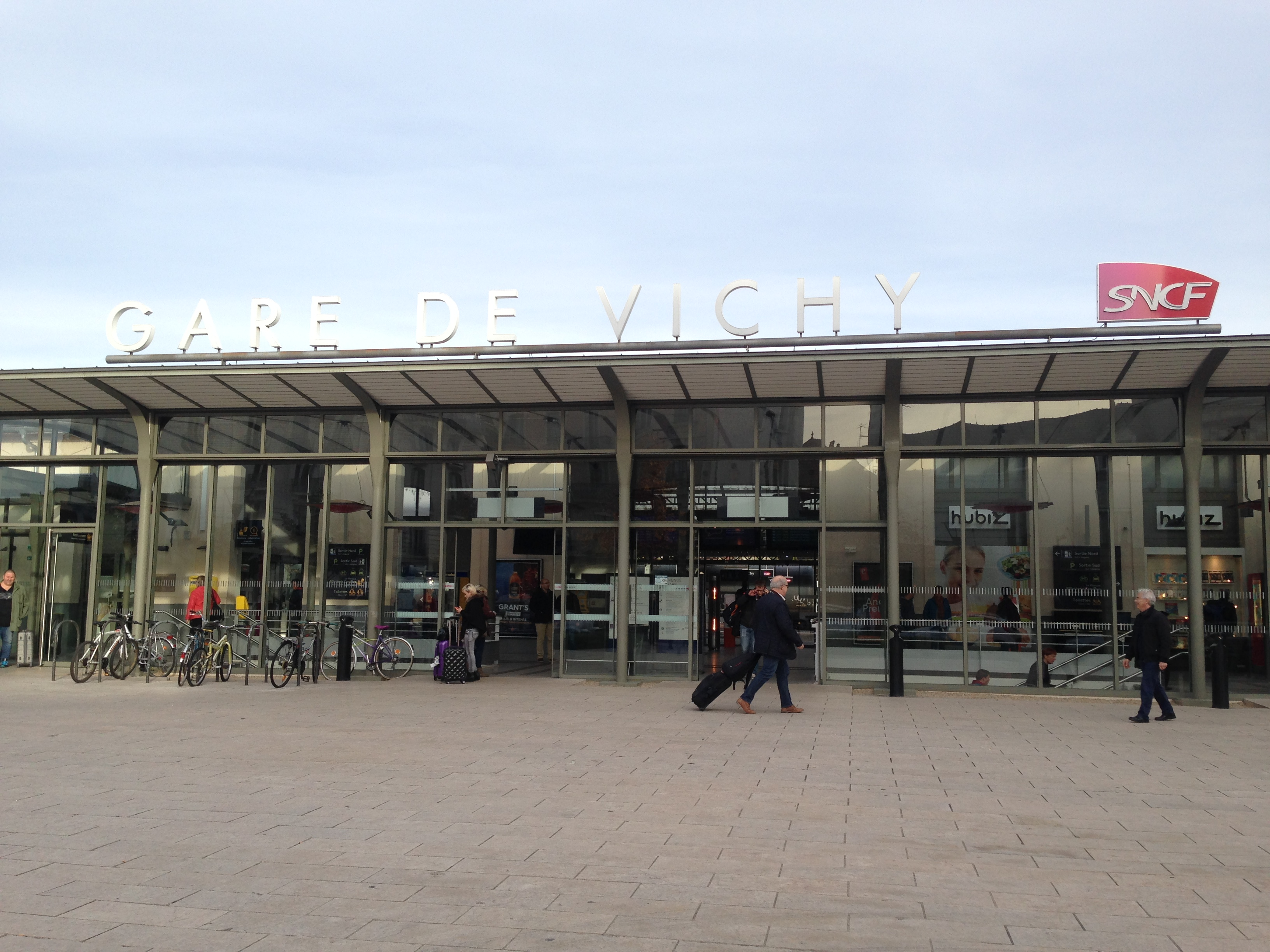 Gare de Vichy-2015